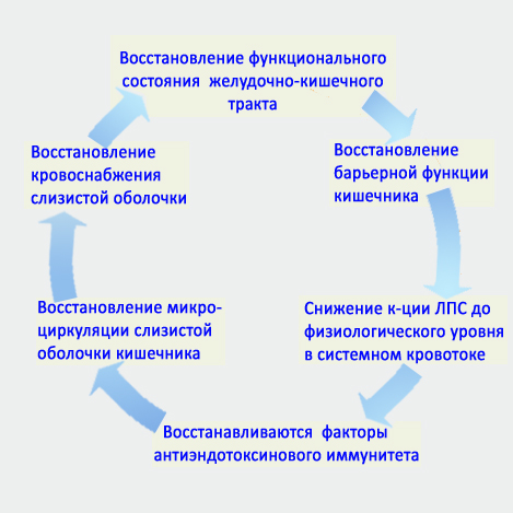 Схема. Показана цепь последовательных изменений приводящих к восстановлению слизистой оболочки и восстановлению кишечного барьера